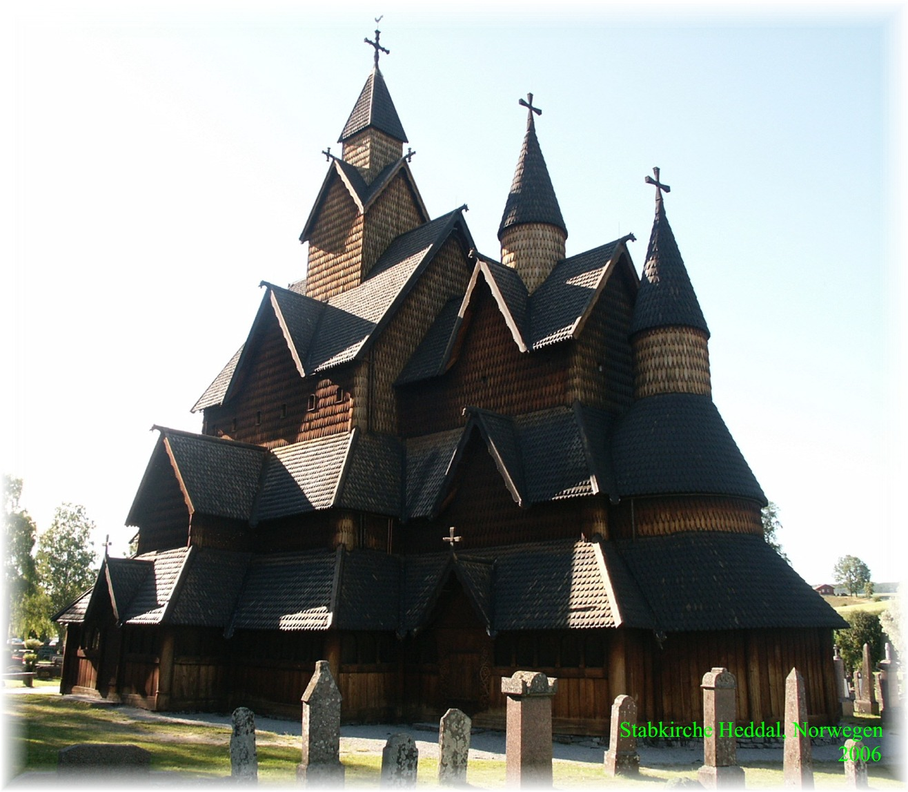 Stabkirche Heddal, Norwegen